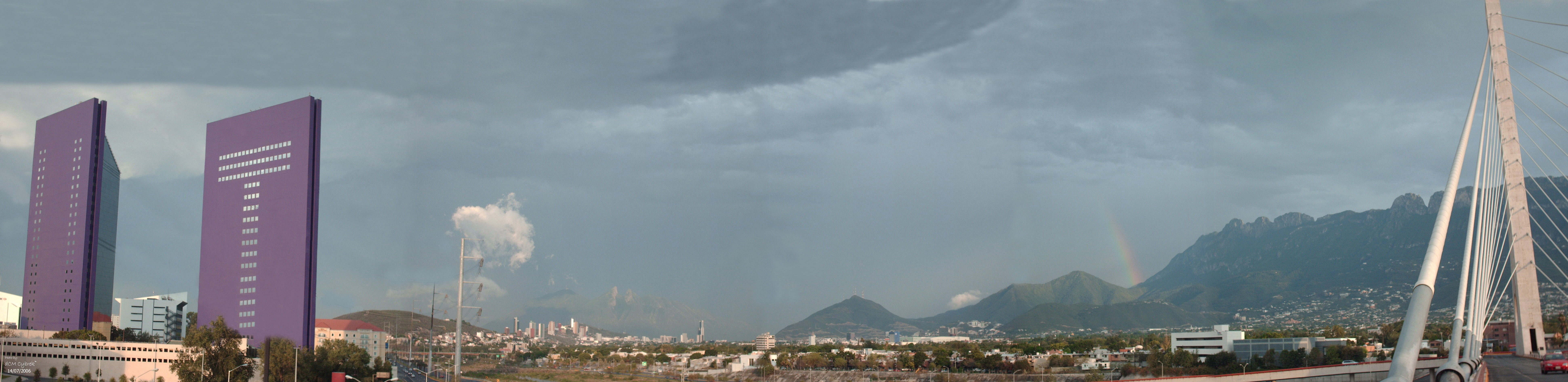 Panoramica de Monterrey desde el Puente Atirantado "Puente de la Unidad"